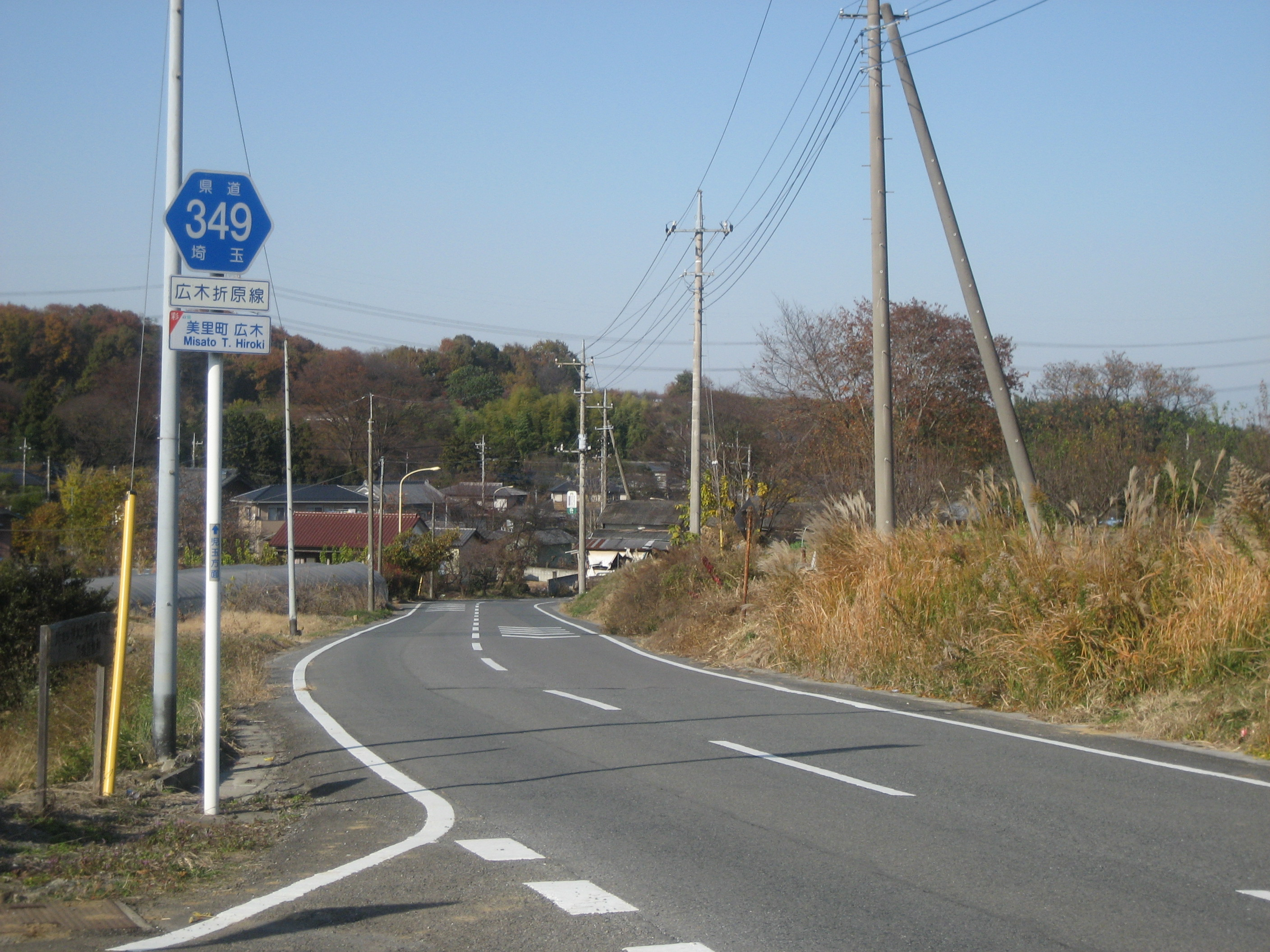 埼玉県道349号線美里町内